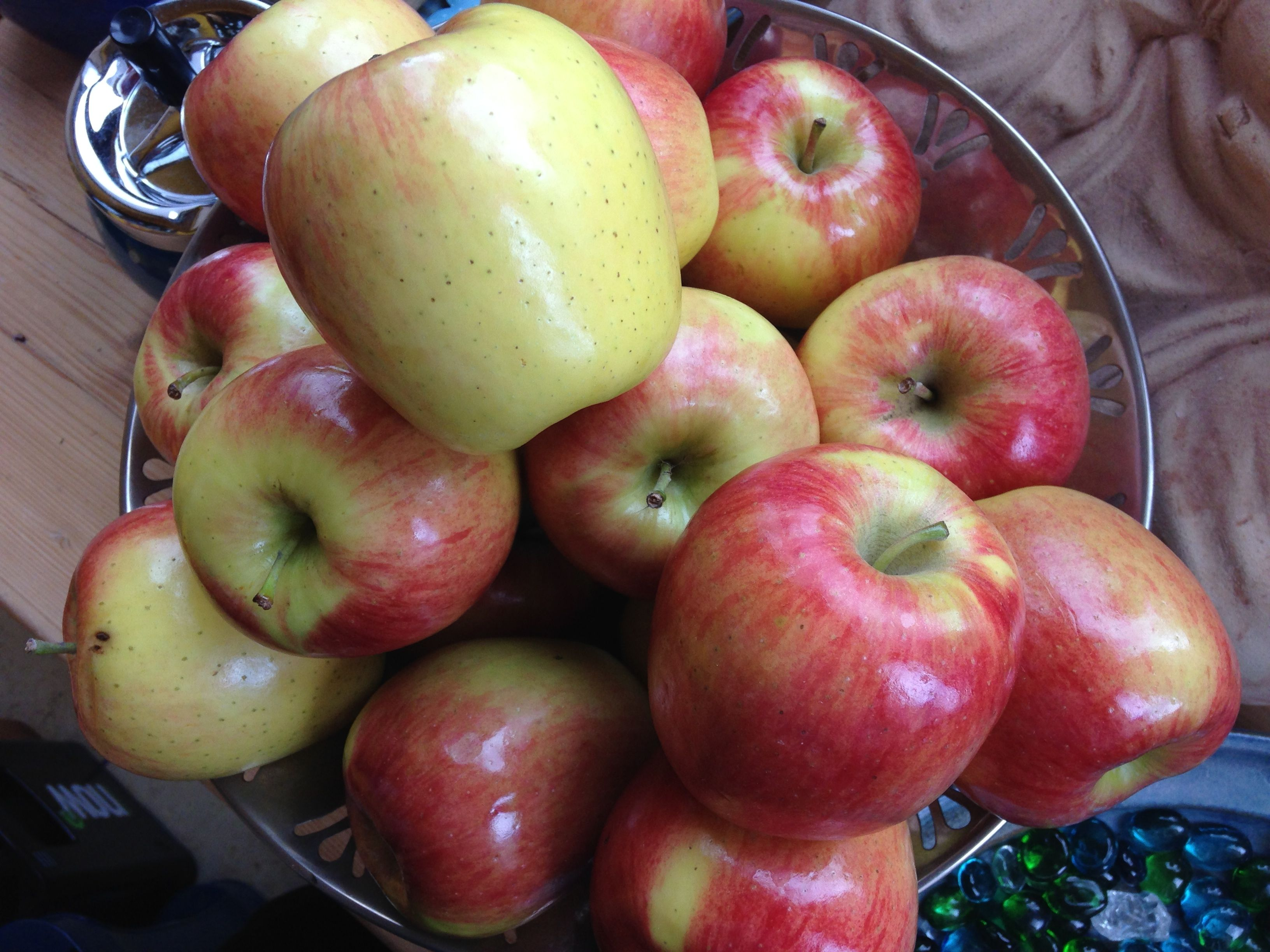 Eine Apfelsorte, die ca. 1990 in Kanada entdeckt und kultiviert wurde. Süß, knackig und hervorragend lagerbar.